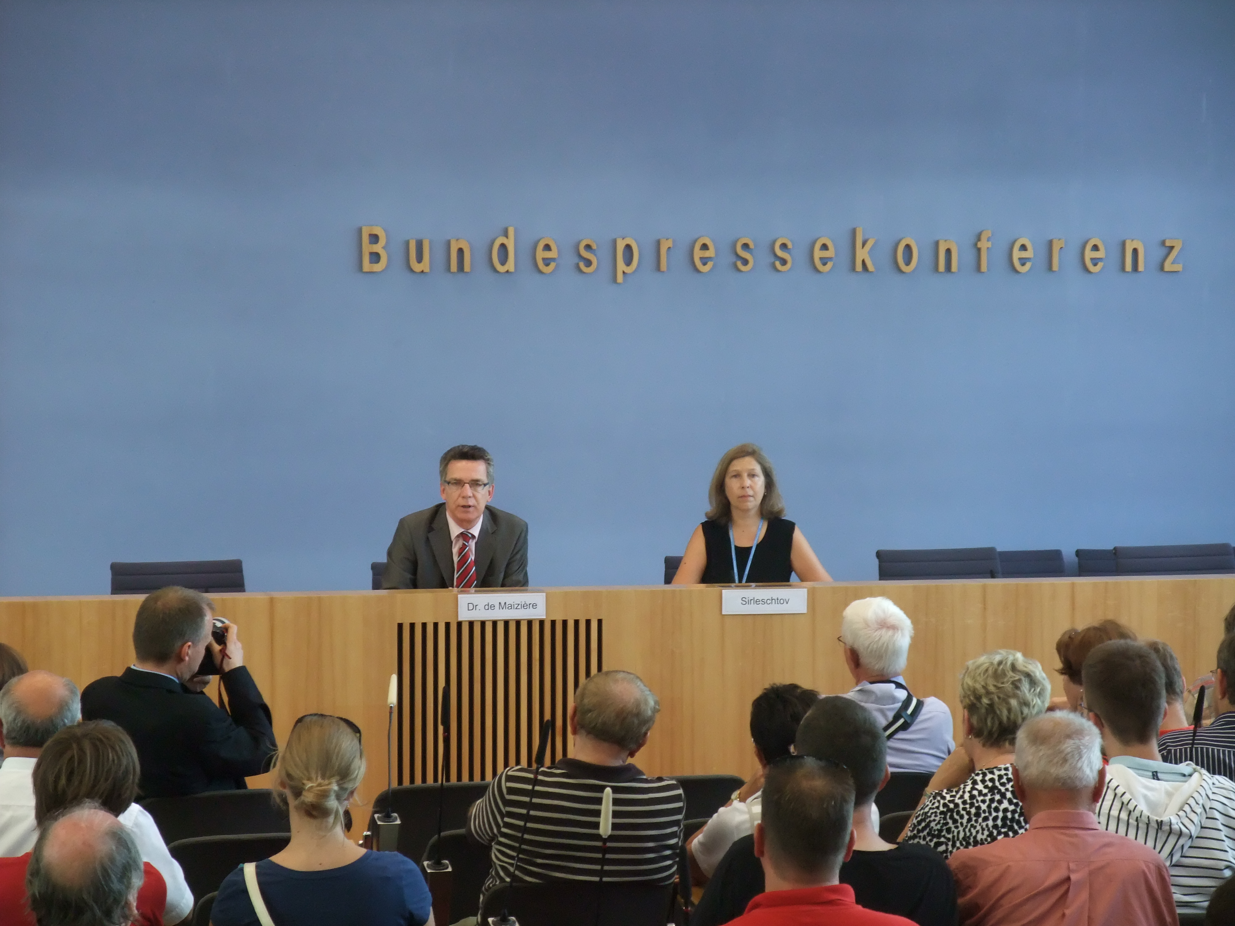 Thomas de Maizière in der Bundespressekonferenz während des Tages der Offenen Tür 2010